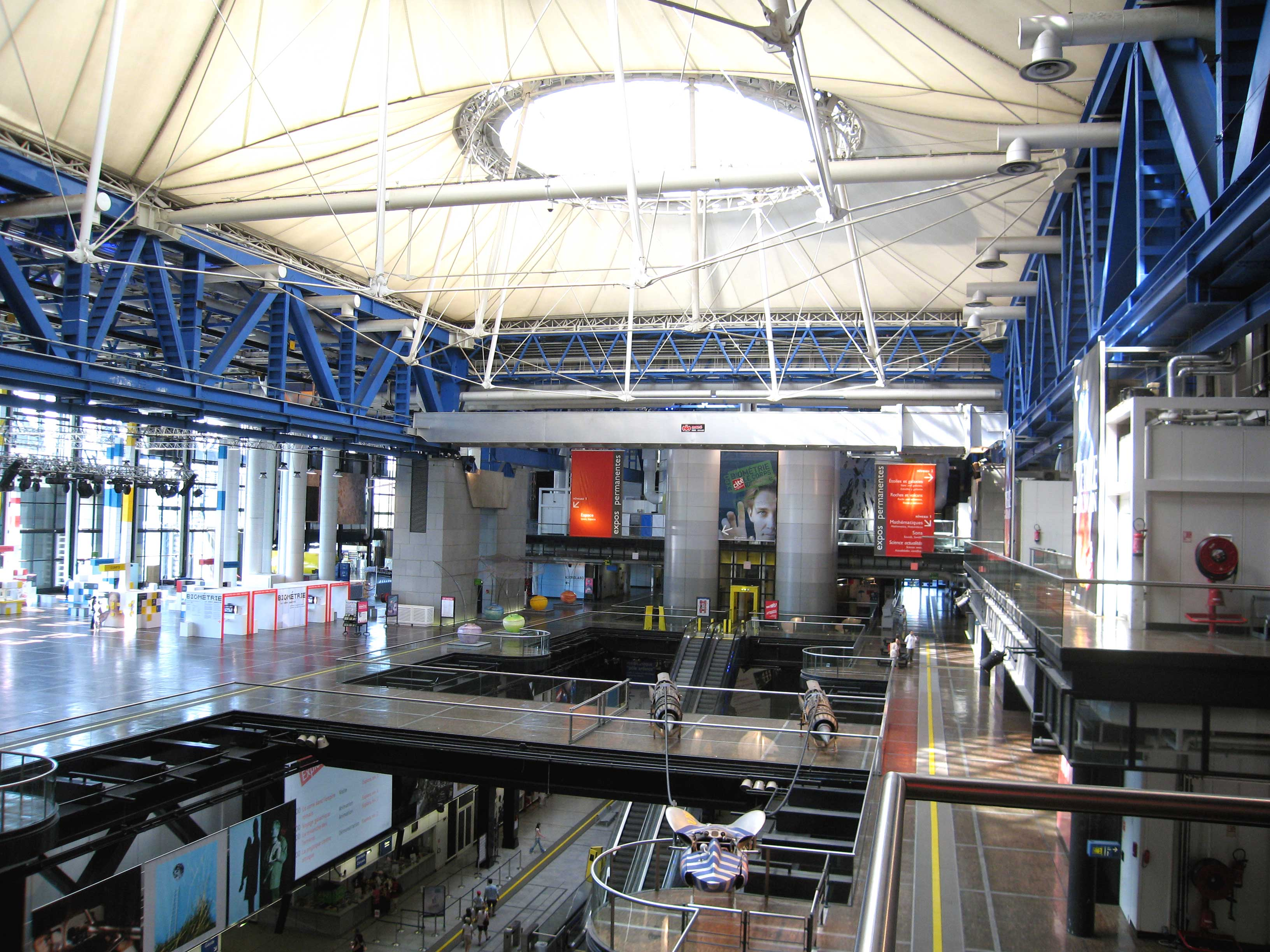 Description : Musée des Sciences et des techniques de la Villette, vue intérieure Place : Musée des Sciences et des Techniques, Paris, France Date : Juillet 2006 Auteur : Pline Photo personnelle